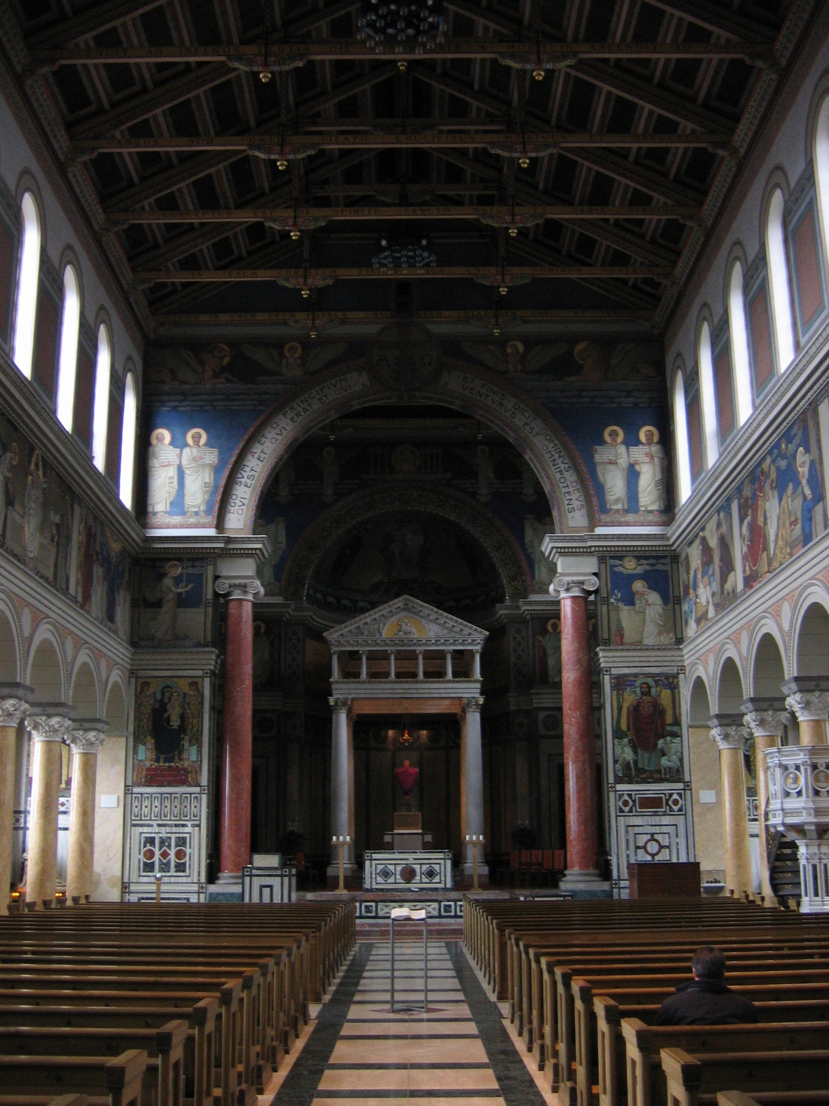 Innenansicht der Liebfrauenkirche zu Zürich.